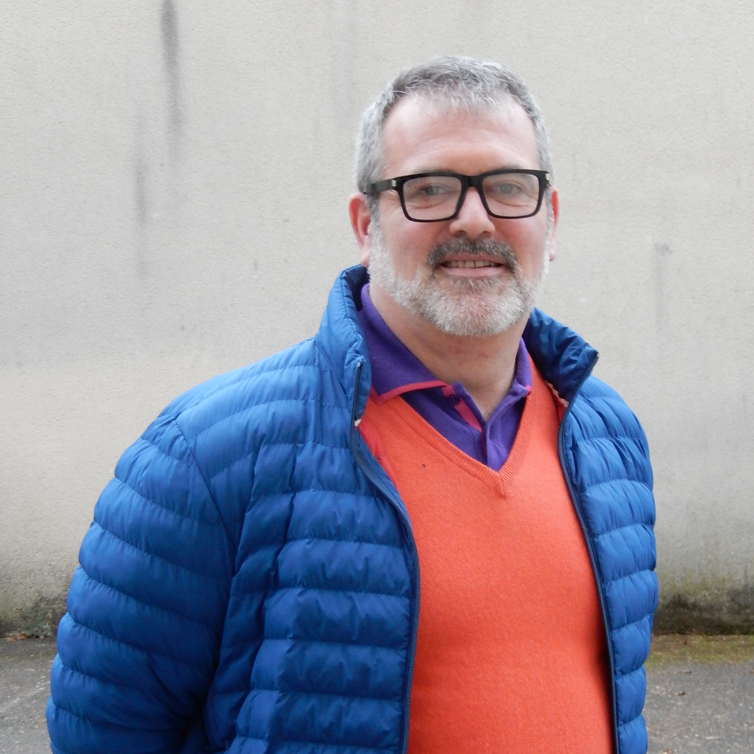 Le député français Raphaël Gérard, de la quinzième législature de la cinquième République, élu pour la quatrième circonscription de la Charente-Maritime. Photo prise le 12 janvier 2020.